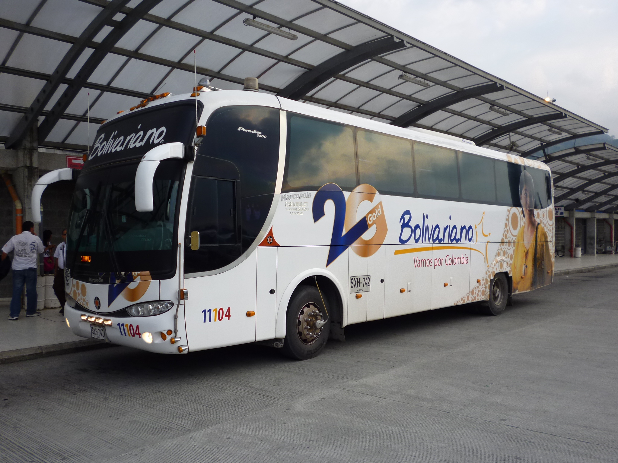 Servicio directo de terminal a terminal que cuenta con el mejor servicio de entretenimiento a bordo. Opera en los corredores de Bogotá, Cali y Medellín